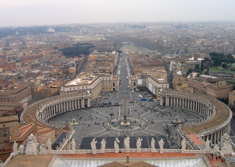 Autoriaus nuotrauka, 2006.03.19. Vatikanas. Šv.Petro (San Piedro) aikštė iš Šv.Petro bazilikos kupolo. Nuotrauka gali būti platinama pagal GFDL licenciją.